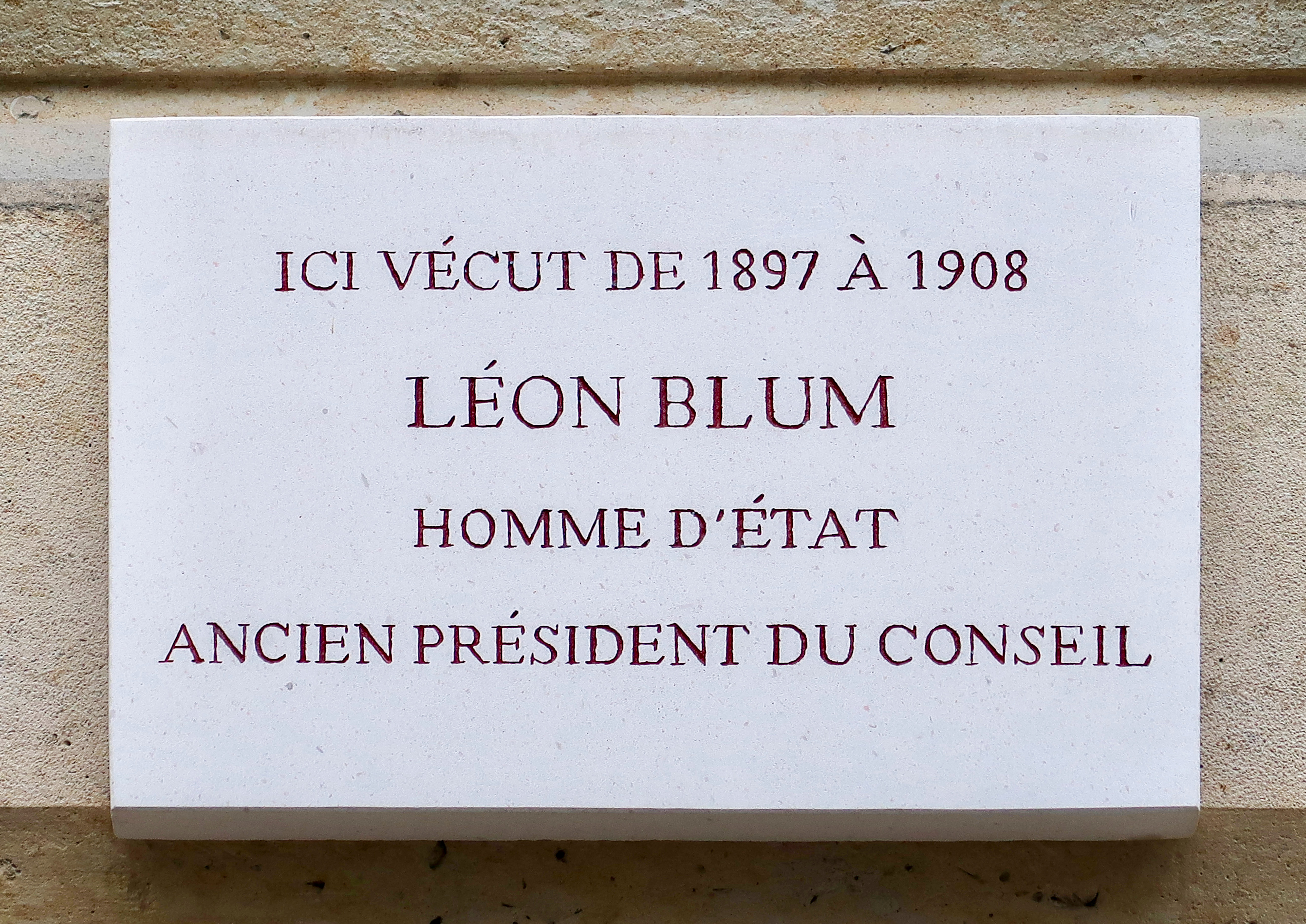 Plaque en hommage à Léon Blum, 38 rue Guynemer (Paris, 6e).